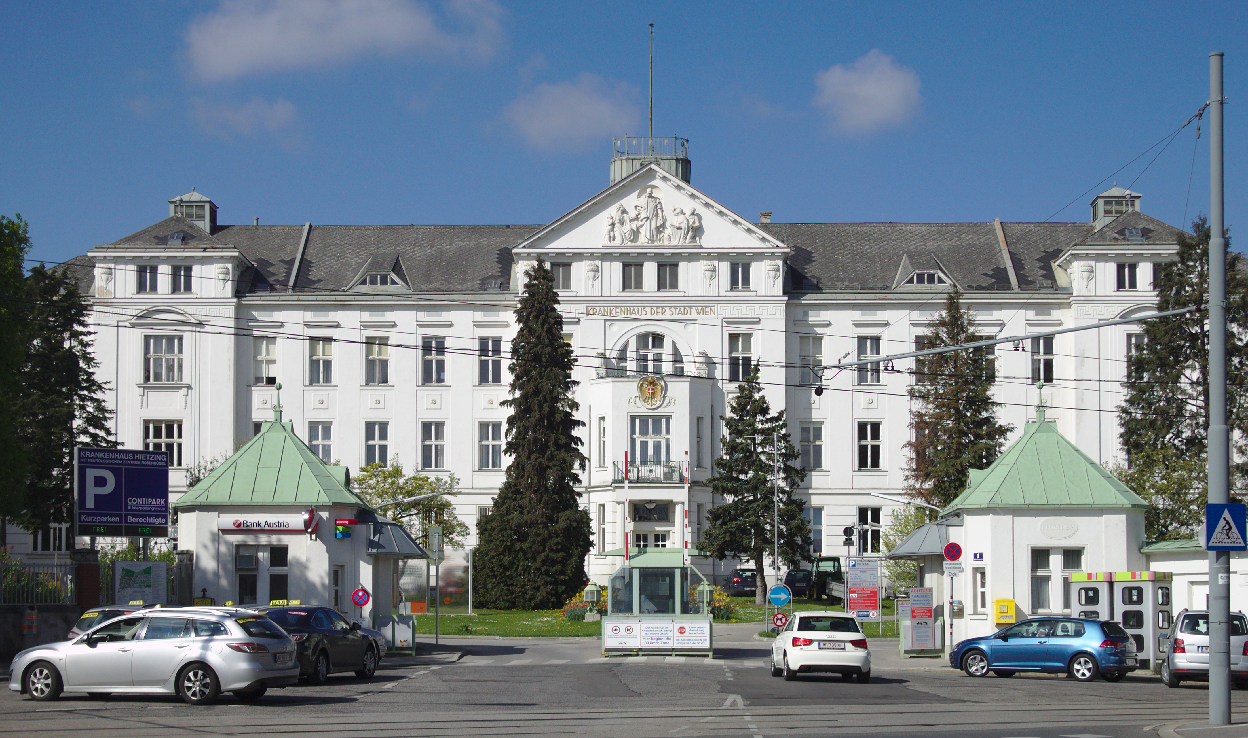 Gesamtanlage, Krankenhaus der Stadt Wien Lainz